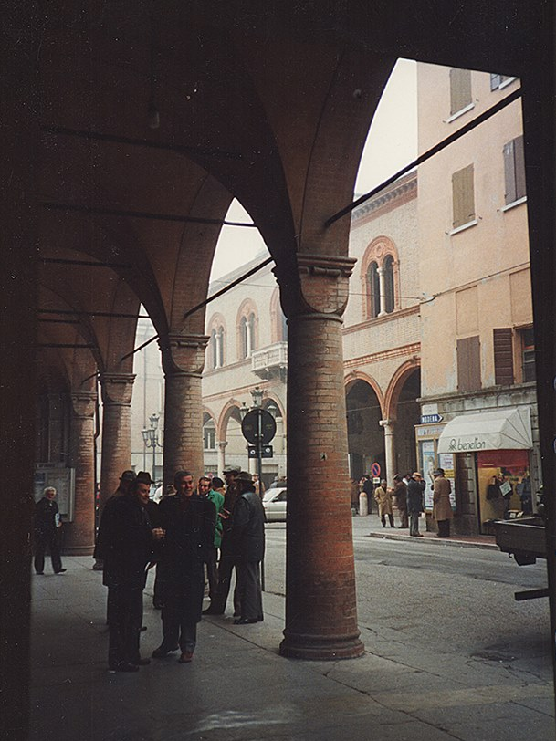 Il palazzo municipale di Mirandola visto dal portico di Palazzo Bergomi nel 1989